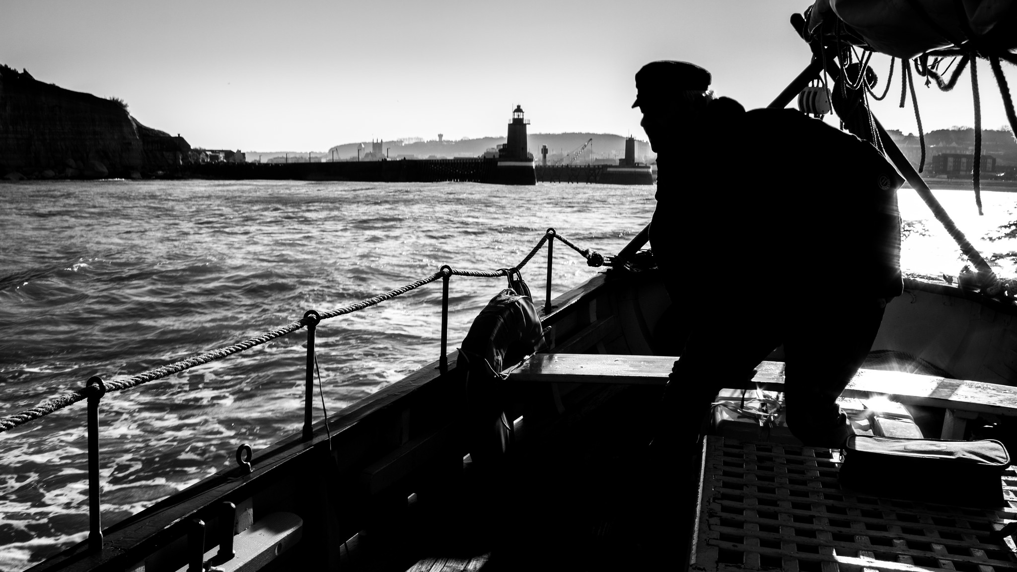 Le capitaine Daniel Billiau sur le Côtre-Pilote professeur Gosset